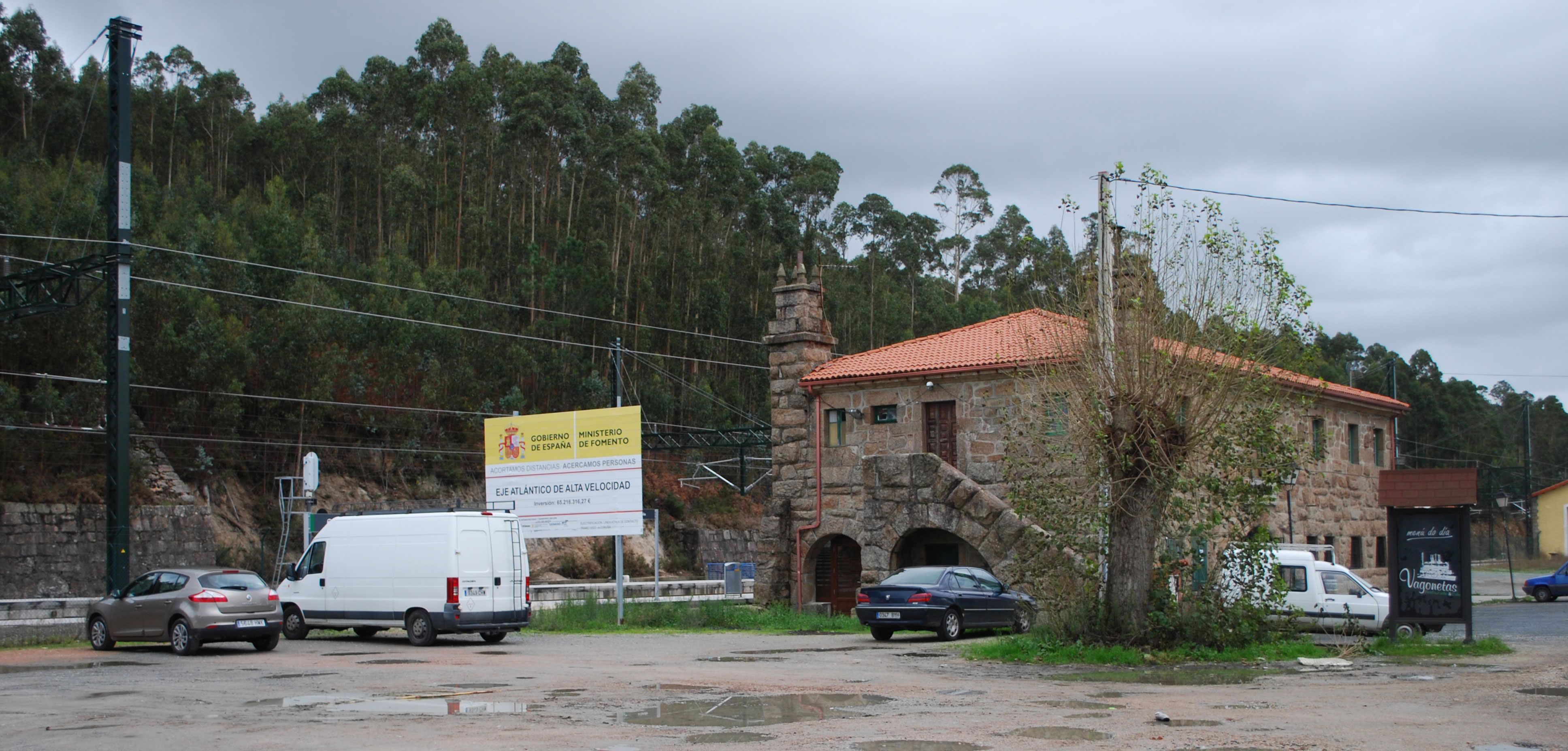 Vista da Estación de Uxes en Arteixo Morás A Coruña Galiza Spain